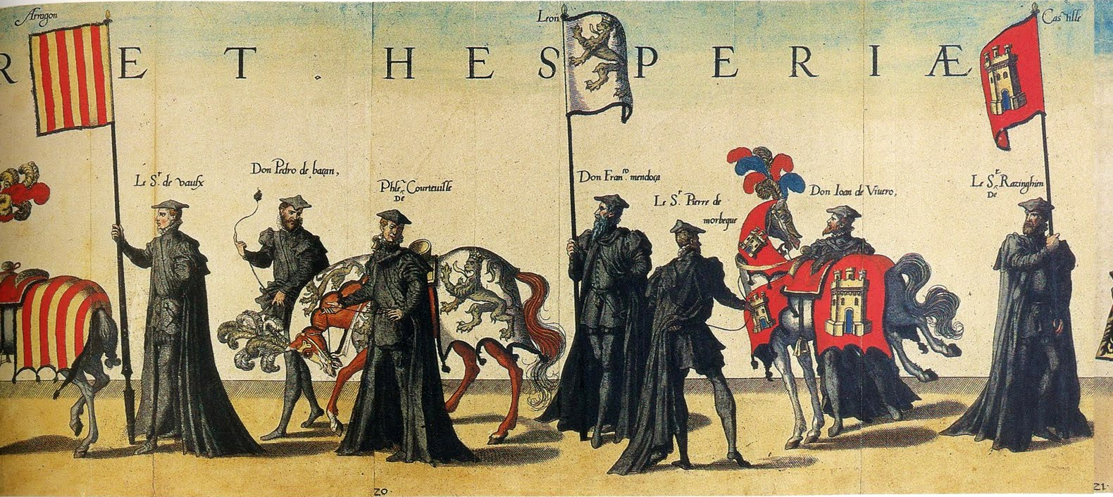 Escudos de Aragón, de León y de Castilla en las exequias de Carlos I de España, V del Sacro Imperio Romano Germánico